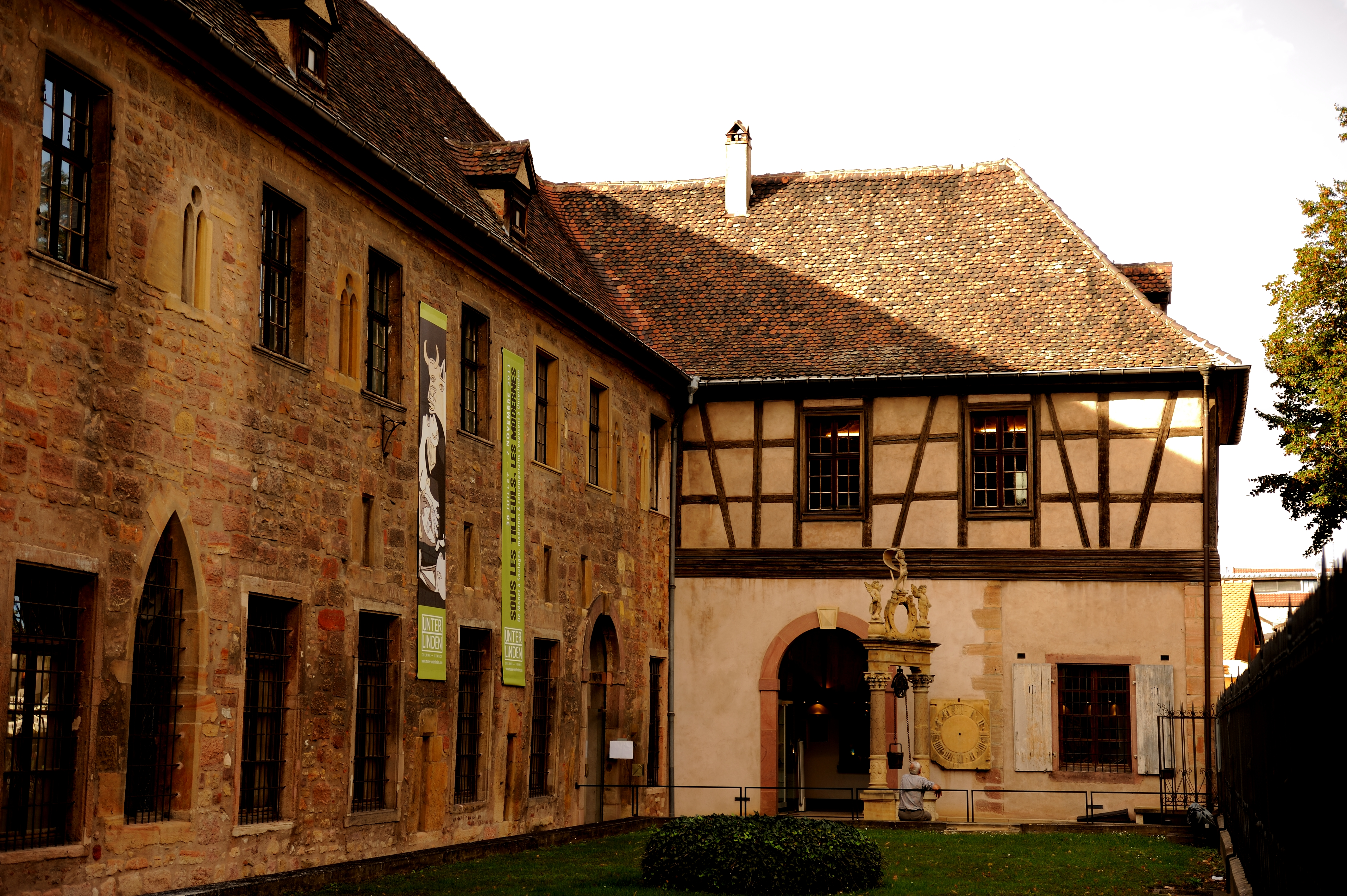 Vue de l'entrée et du puits. .